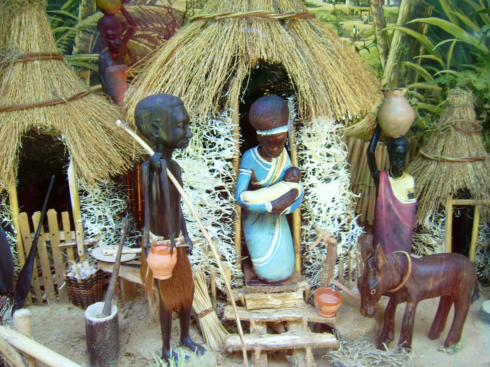 Krippe im Steyler Missionshaus in St. Wendel